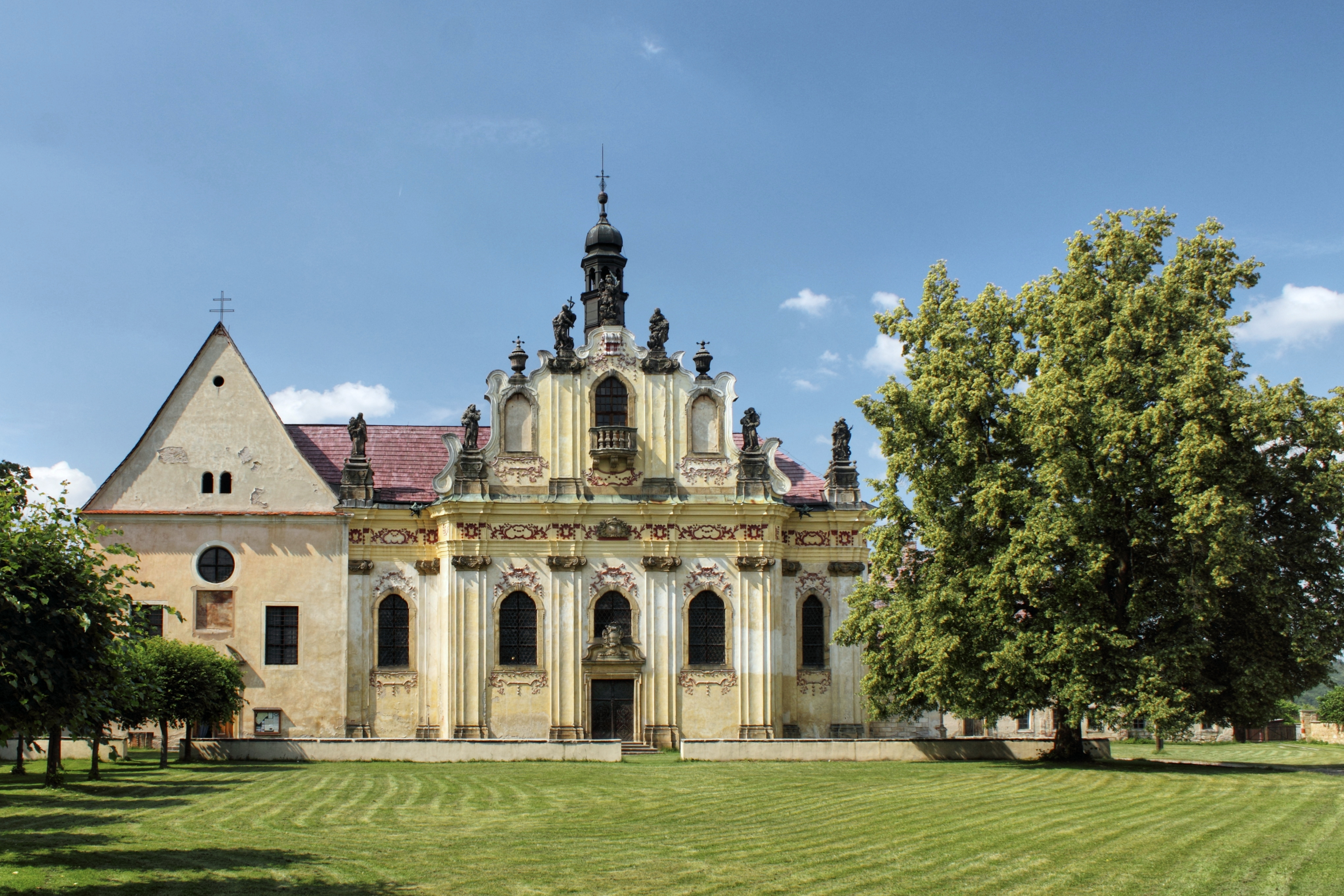 Klášter býv. kapucínský (Mnichovo Hradiště), V Lípách 151, Mnichovo Hradiště